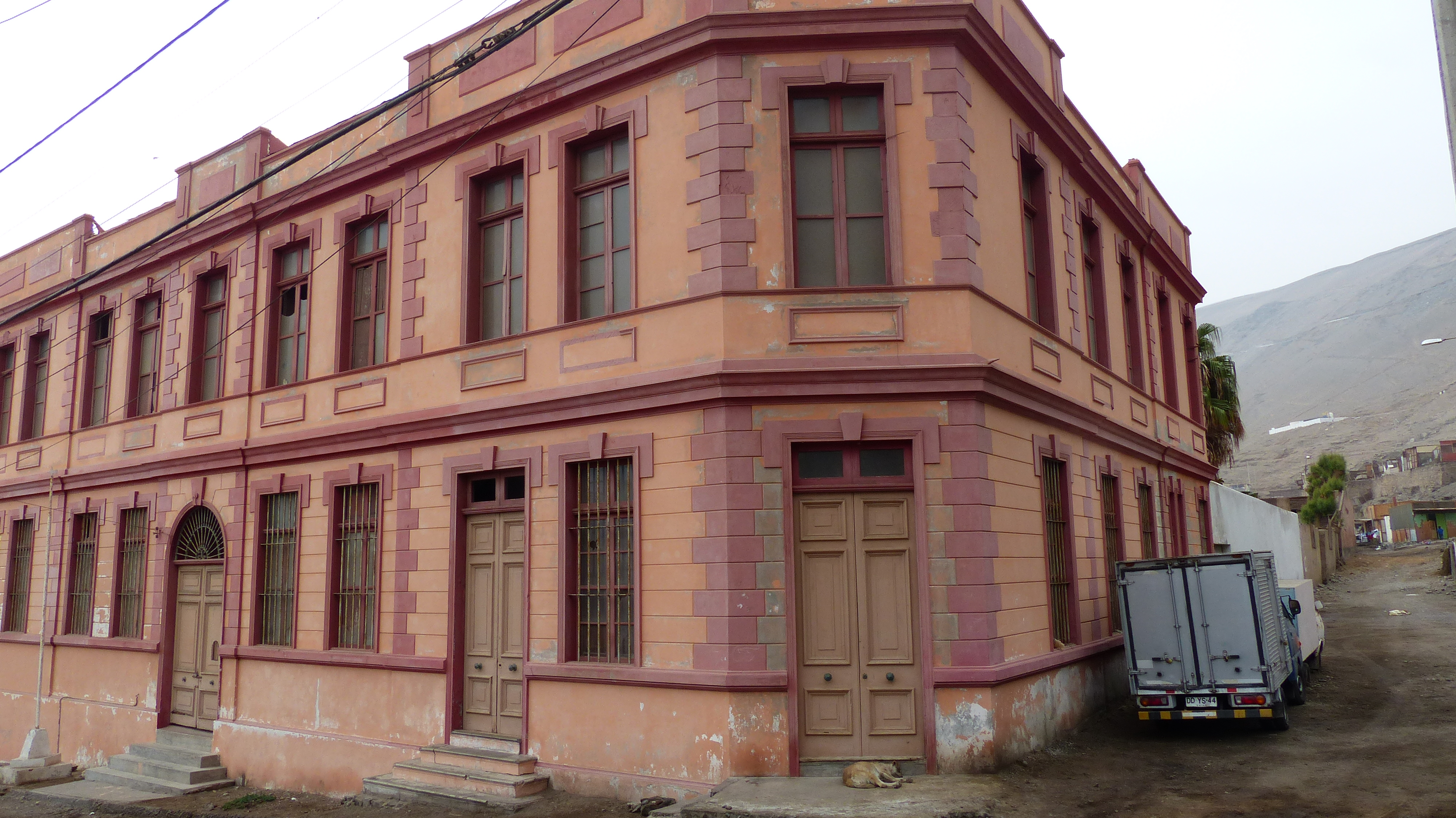 Cárcel Pública de Pisagua This is a photo of a national monument in Chile: 287